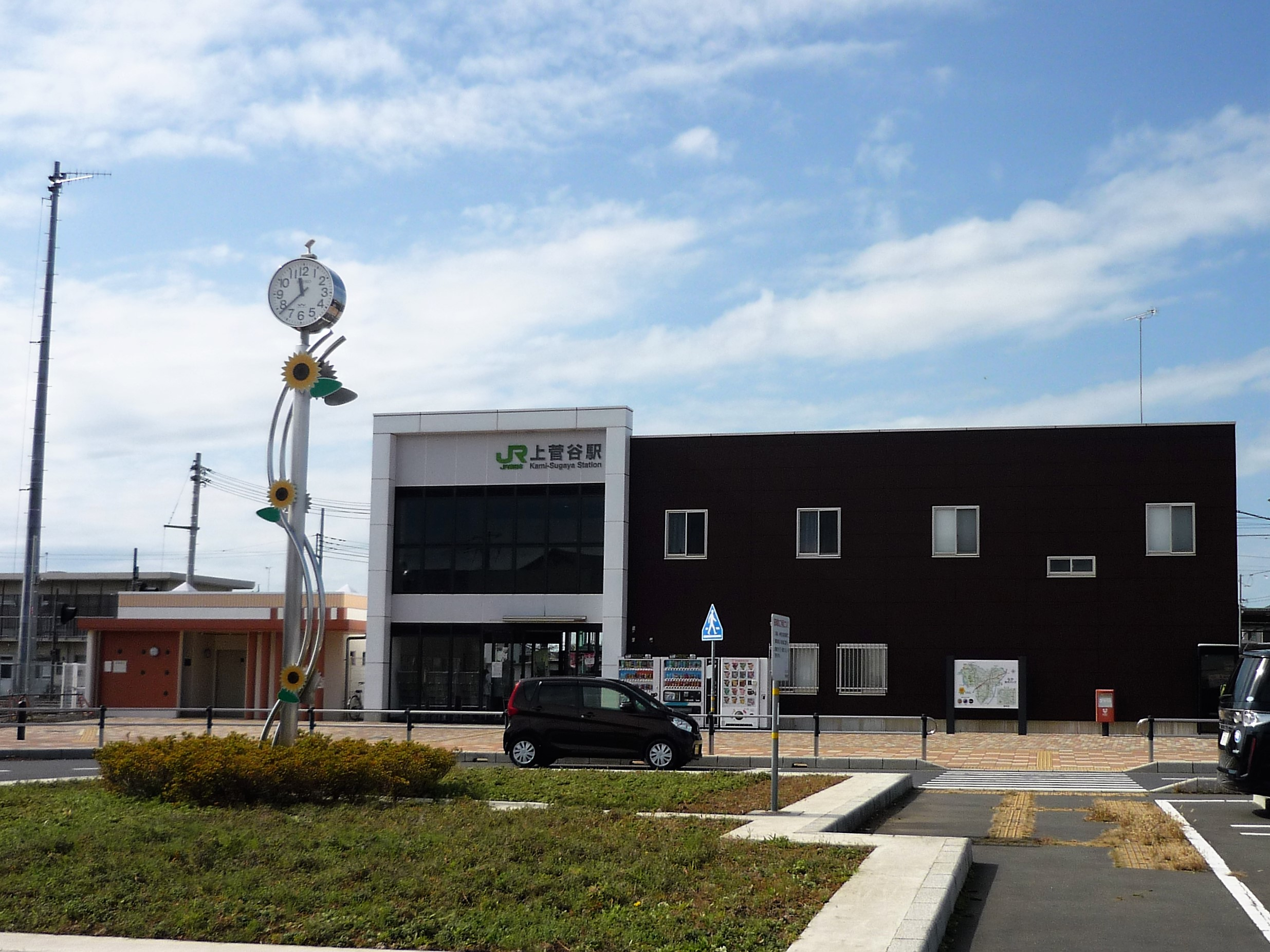 上菅谷駅舎 Panasonic Lumix DMC-FS3